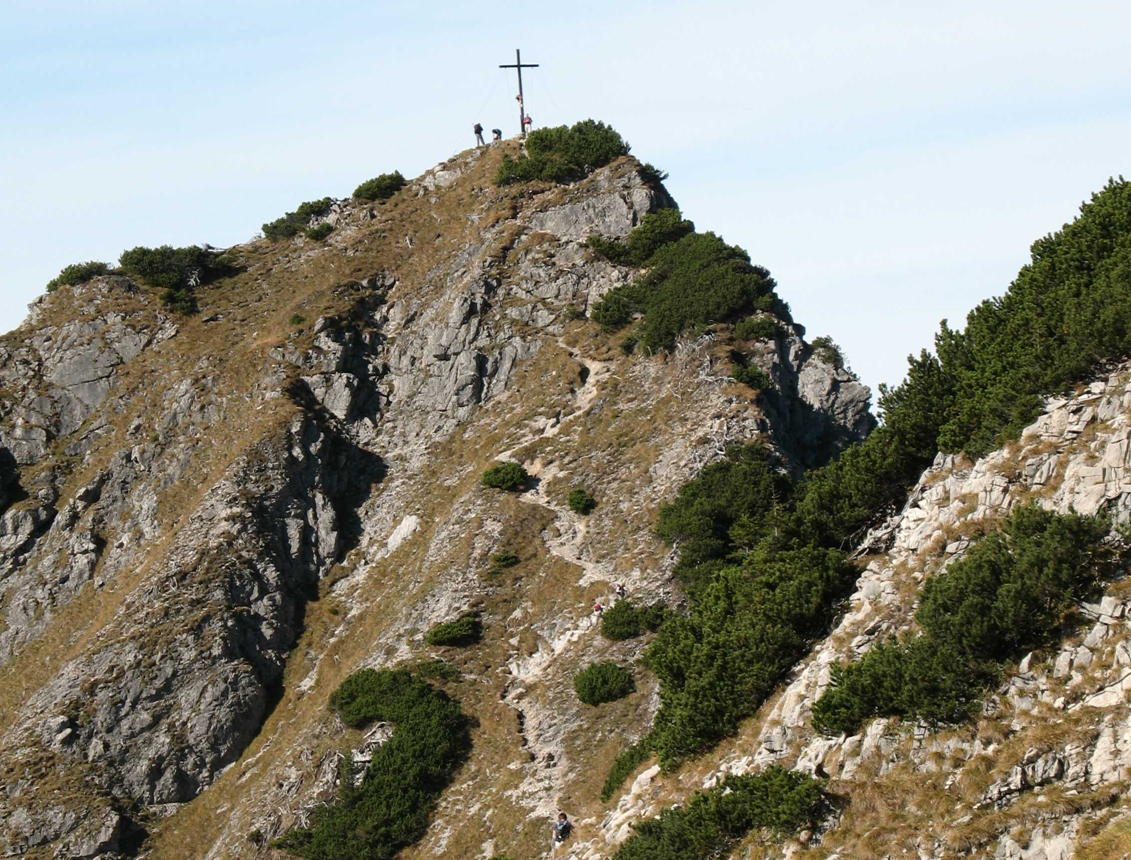 Blick auf das Gaisalphorn (1953 m), SO-Seite, vom Geißfuß aus